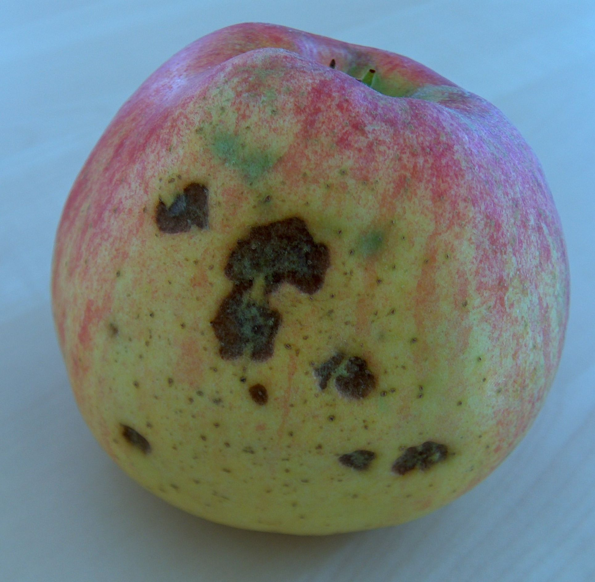 Apfel der Sorte Shampion mit Stippe